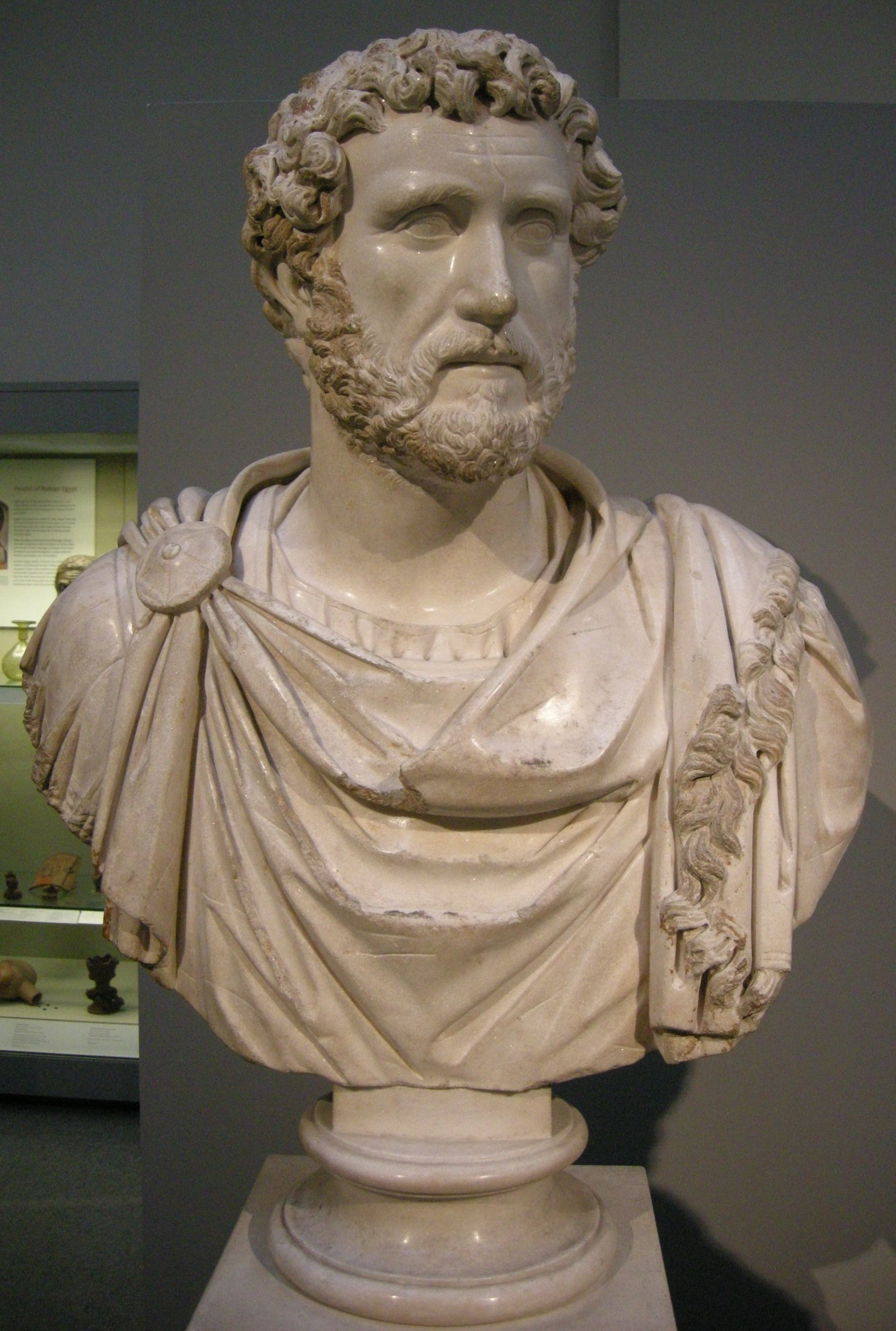 Arte romana, busto di antonino pio, da cirene, libia, 140 circa